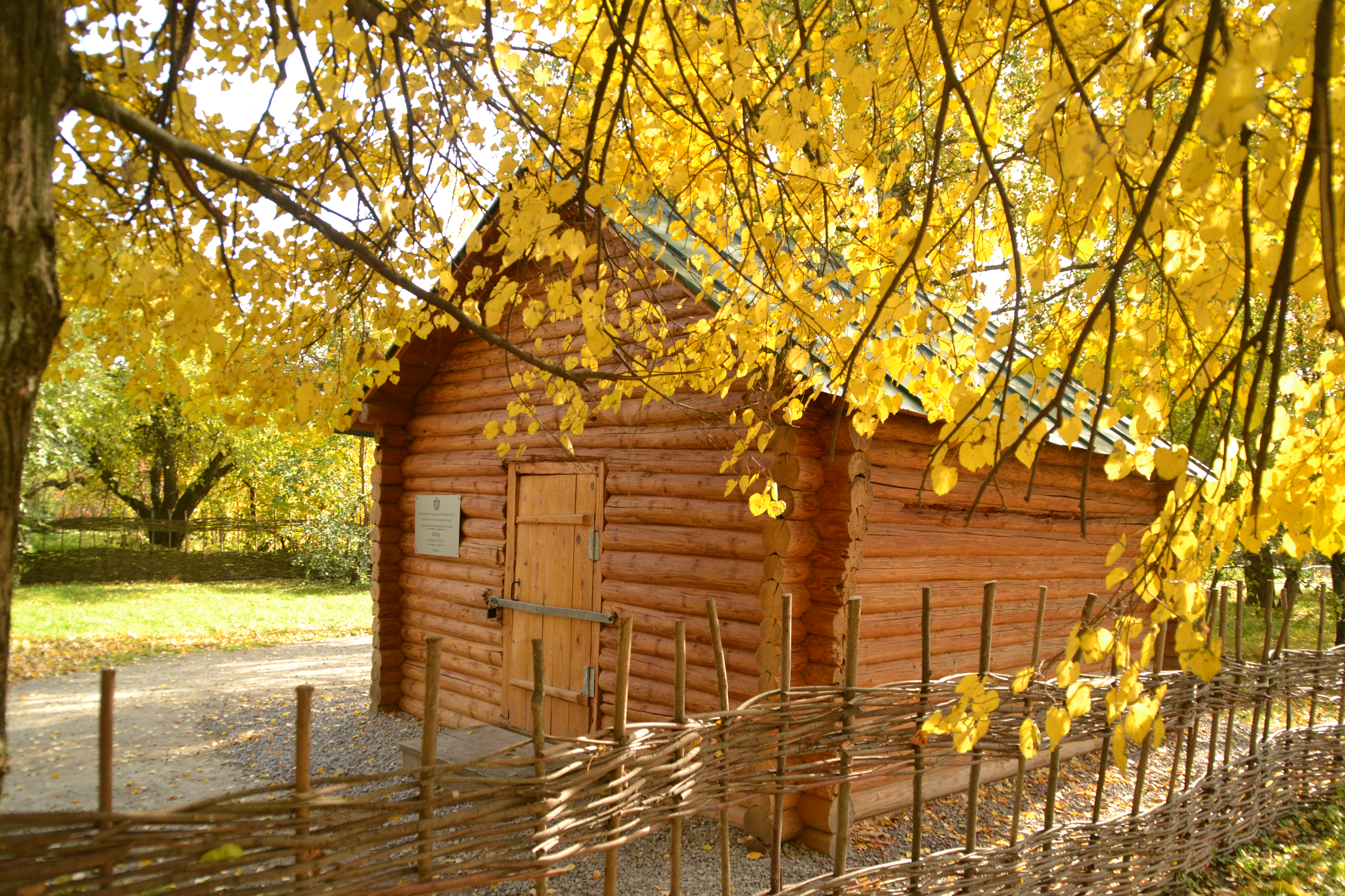 Мемориальный амбар, расположенный на усадьбе родителей поэт. Золотая осень